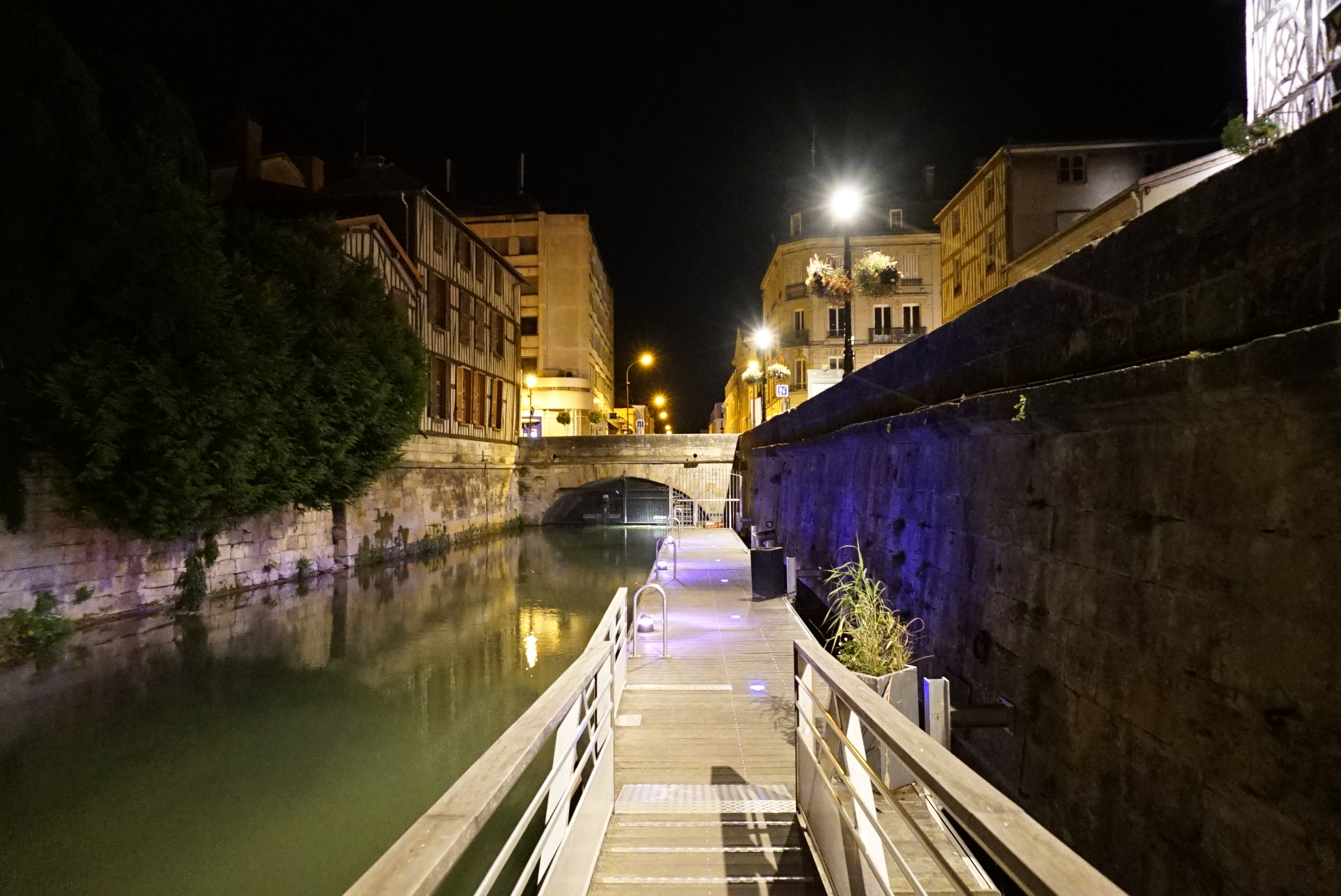 vue de Cf. titre.